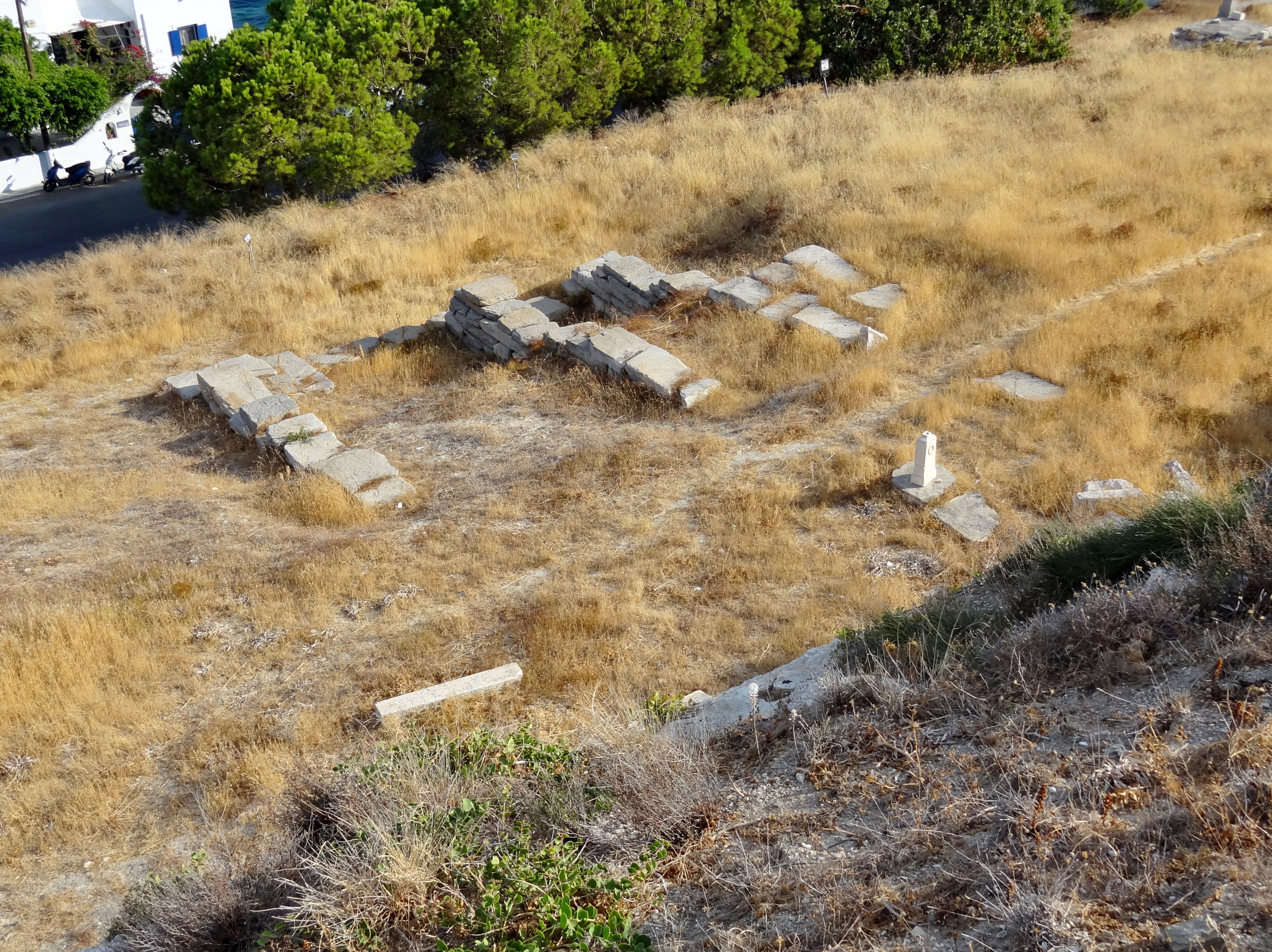 Asklepieion in Parikia auf Paros, Kykladen, Griechenland